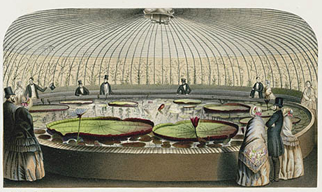 Gewächshaus für die Victoria regia in der Gärtnerei Louis Van Houtte, um 1850